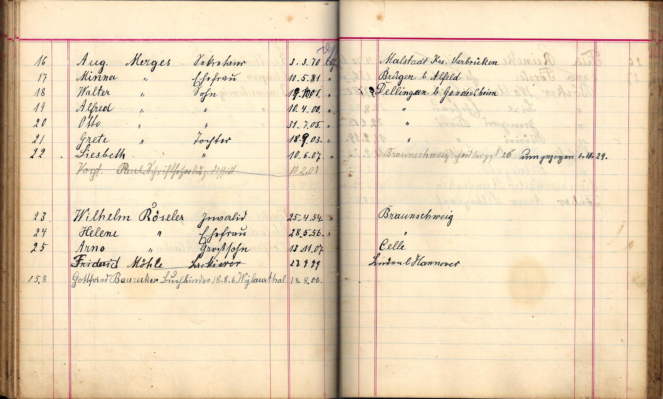 Auszug aus dem Hausbuch Altewiekring 70, geführt von August Böcker mit den Eintragungen für Familie Merges.